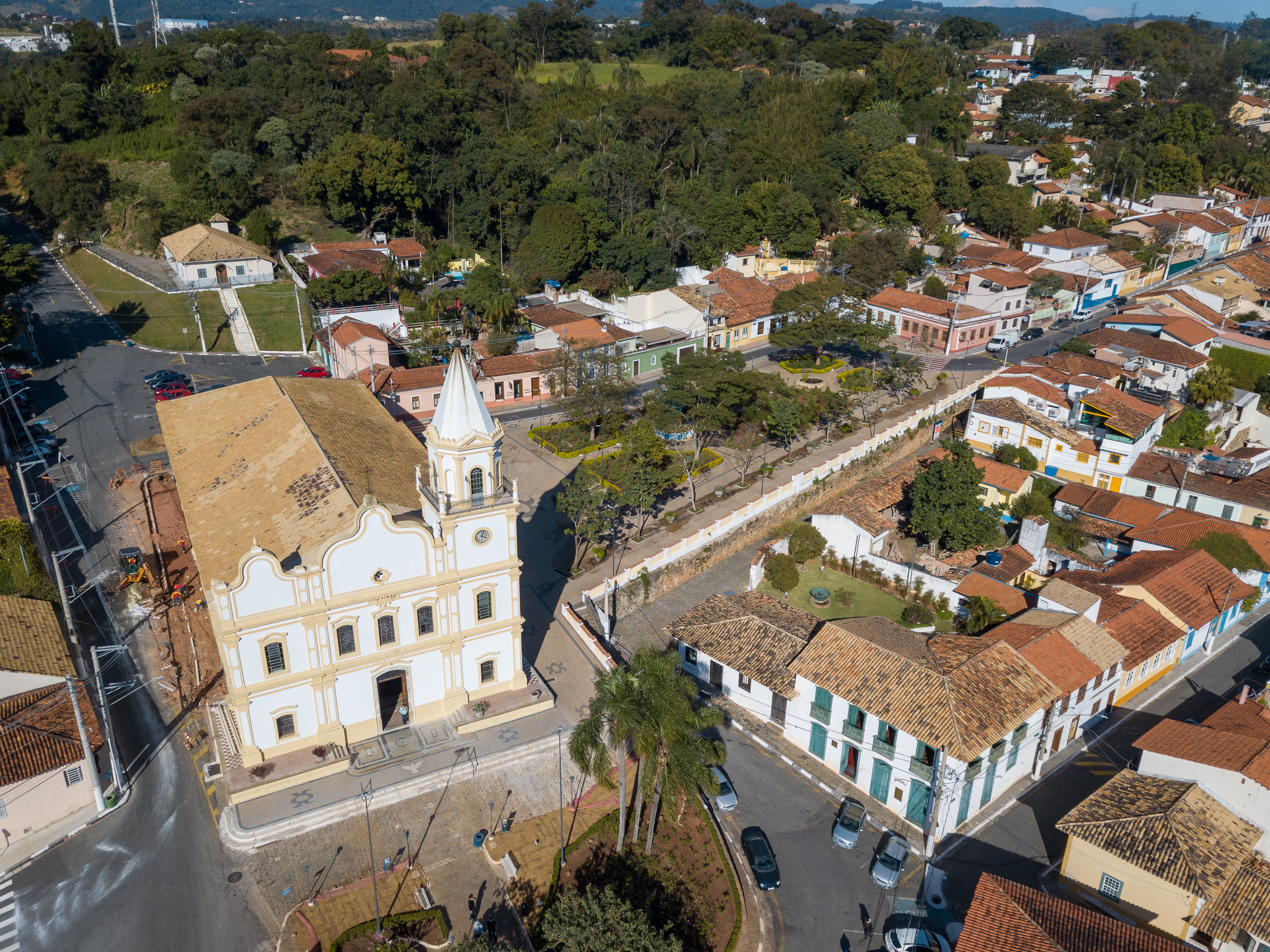 Santana de Parnaíba